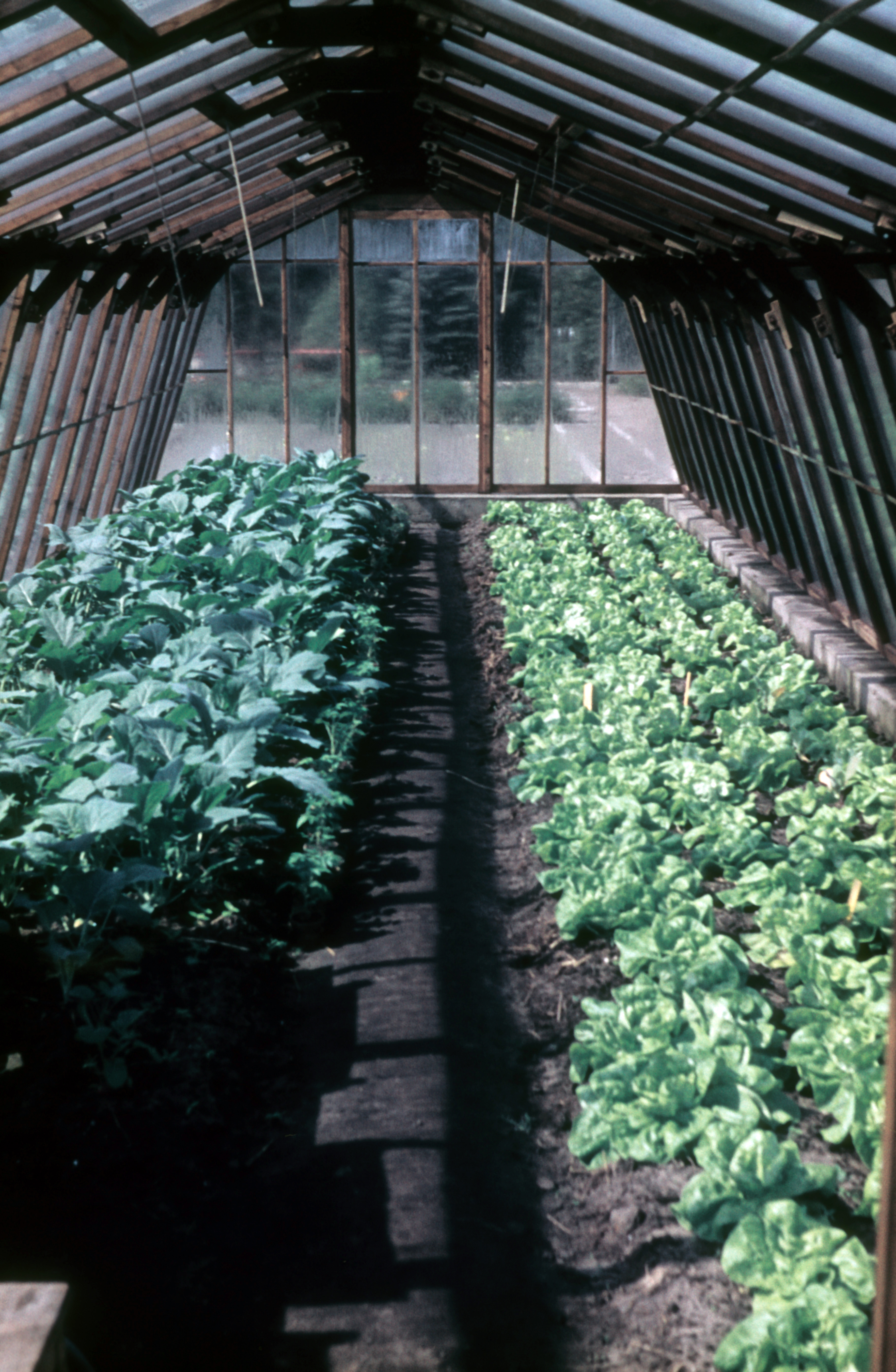 Ruhland, Hartwigstraße, Schulgarten, Teilansicht (im Gewächshaus)